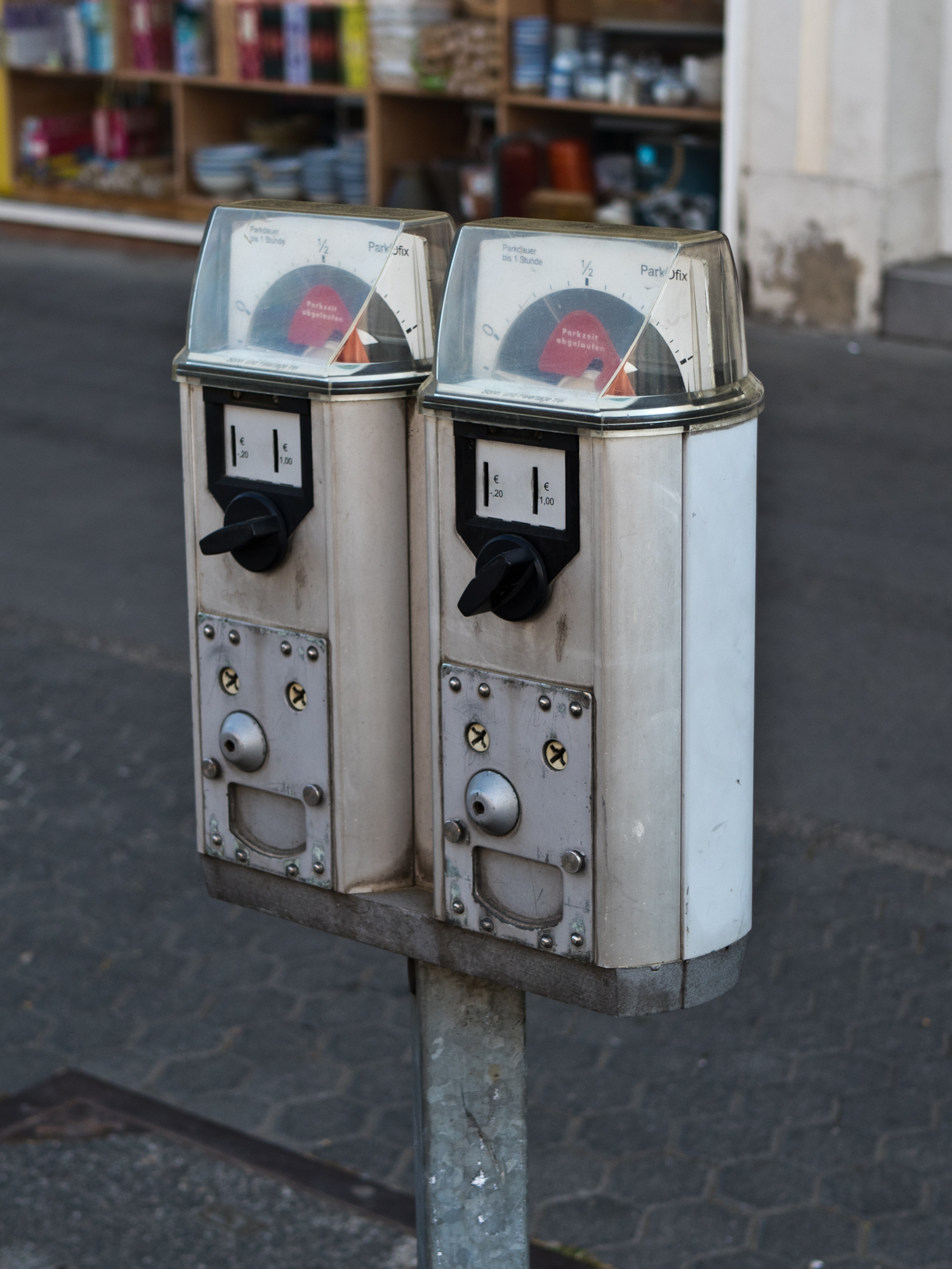 Zwei Parkuhren in Trier, Bahnhofstraße